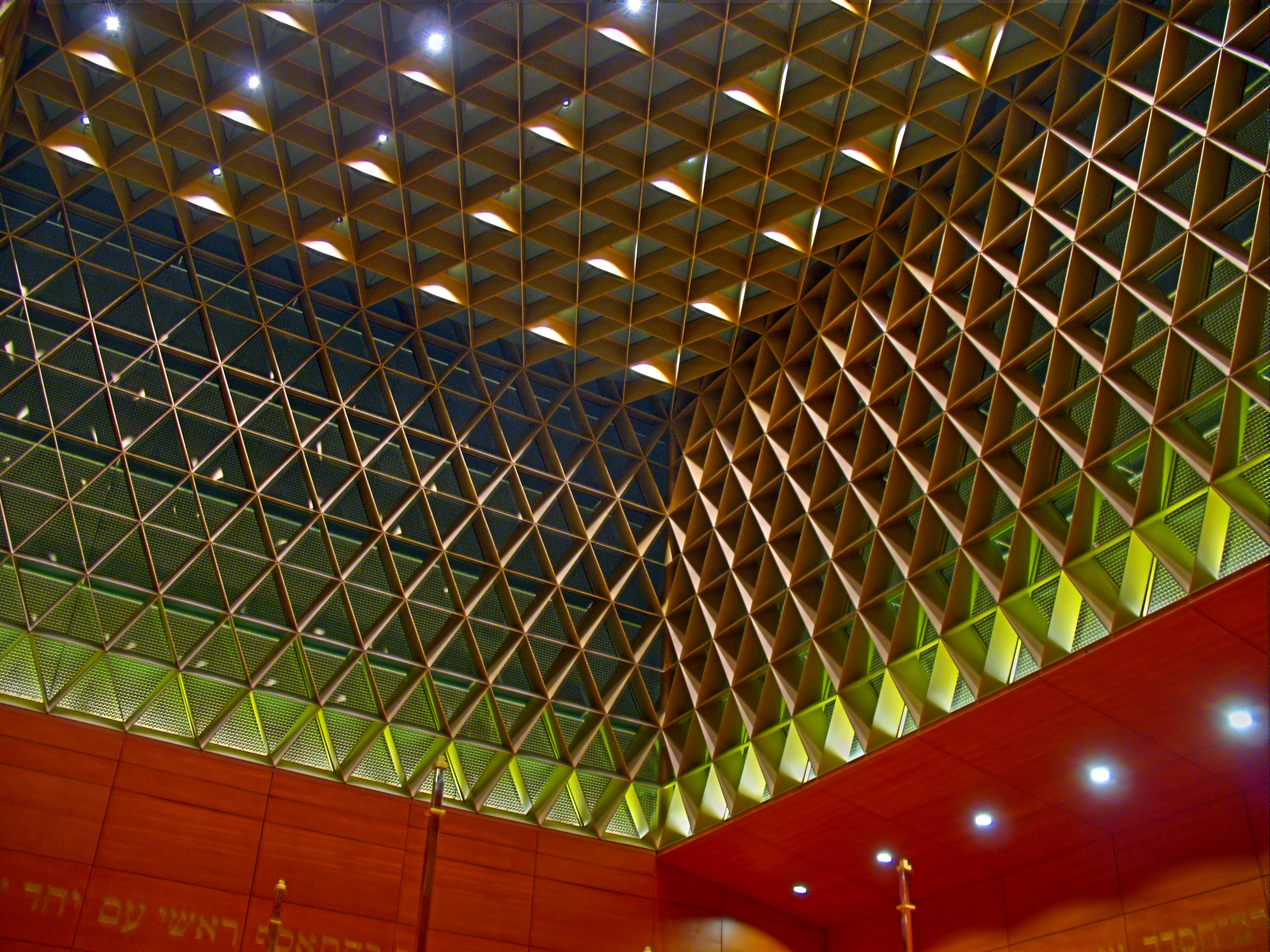 Deutschland, Bayern, München, Jüdisches Zentrum, Synagoge, Kuppel mit Davidsternmotive